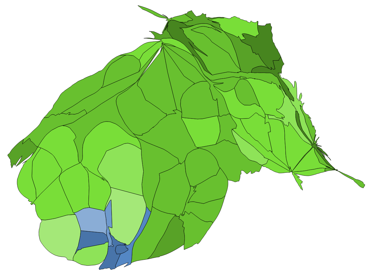 顏色對照表